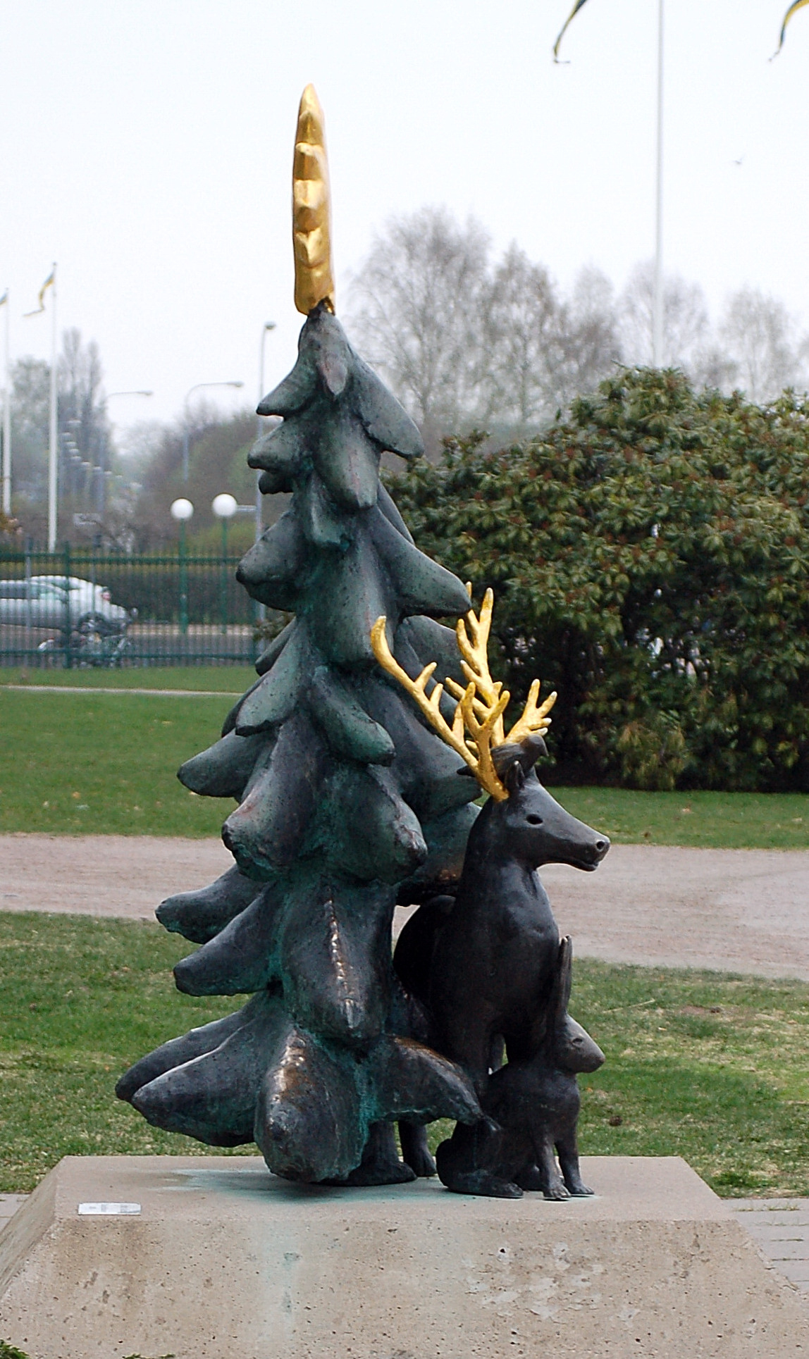 "Under solen" av Klara Kristalova 2006 brons placerad i Mariebergsskogens lekträdgård Karlstad.